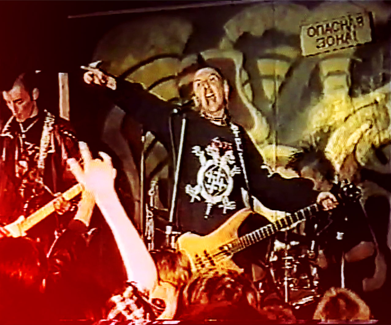 Концерт в городе Тверь 1999 год.